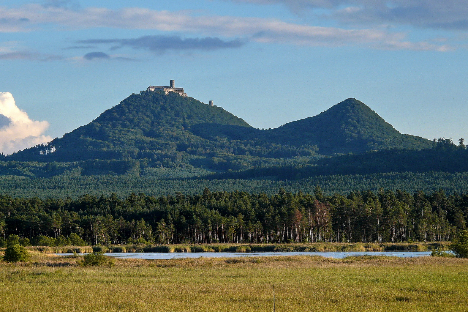 Bezdězy nad Břehyňským rybníkem